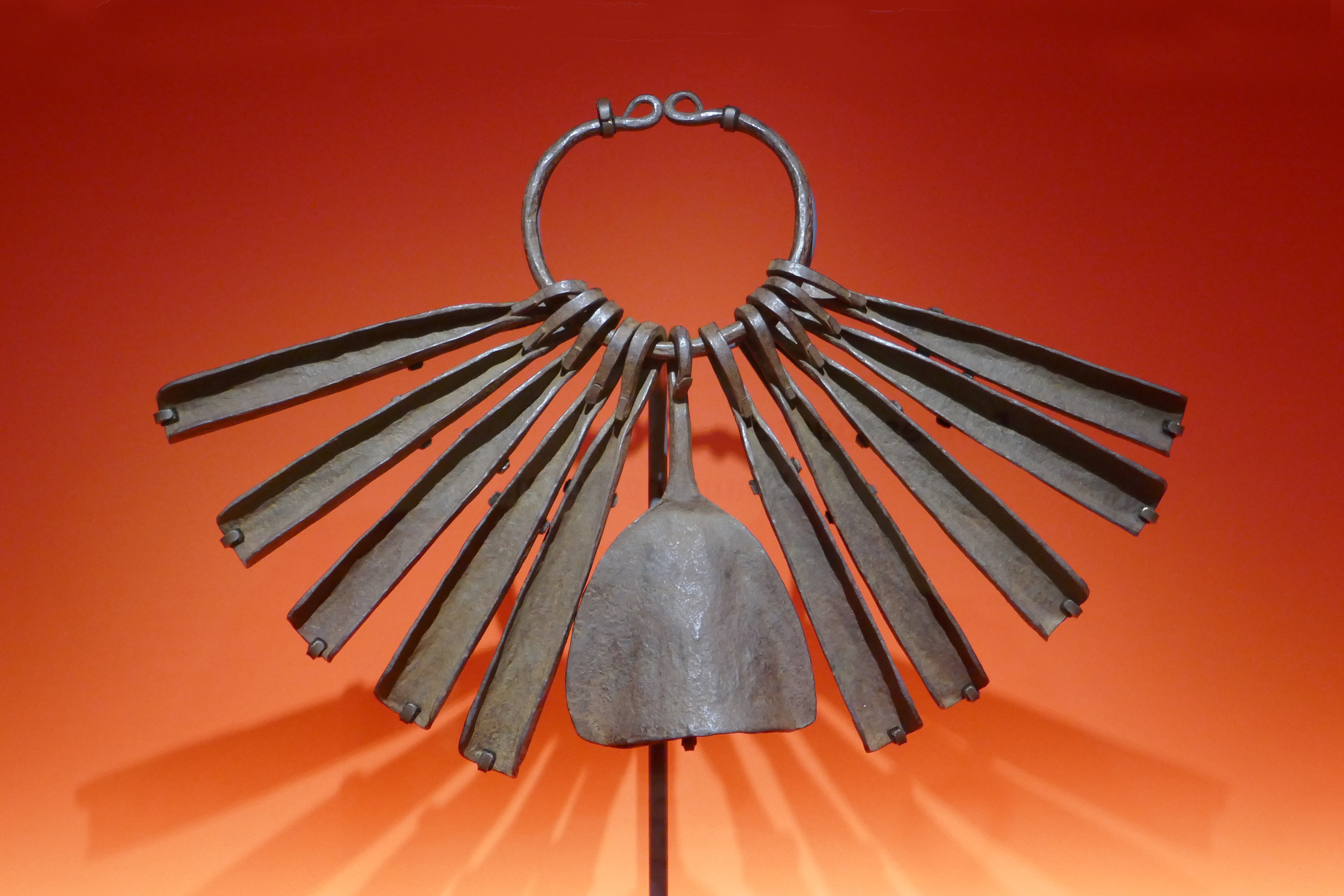 Auteur inconnu Populations Chamba et Vere, Nigeria 19e-20e siècle Fer 55 cm Composé de dix hochets en forme d'auge accrochés de part et d'autre d'un anneau et d'une cloche sans battant. Utilisé exclusivement par les hommes initiés pour annoncer le Jup Kupsa, l'une des plus grandes festivités agricoles du peuple Chamba Collection privée Objet présenté lors de l'exposition Frapper le fer. L'art des forgerons africains au musée du quai Branly Jacques Chirac.